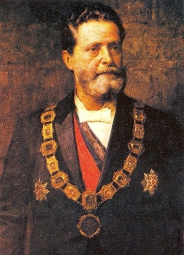 Karl Lueger (1844–1910) mit Bürgermeisterkette, um 1900.